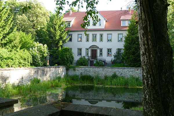 Herrenhaus Ostramondra April 2015